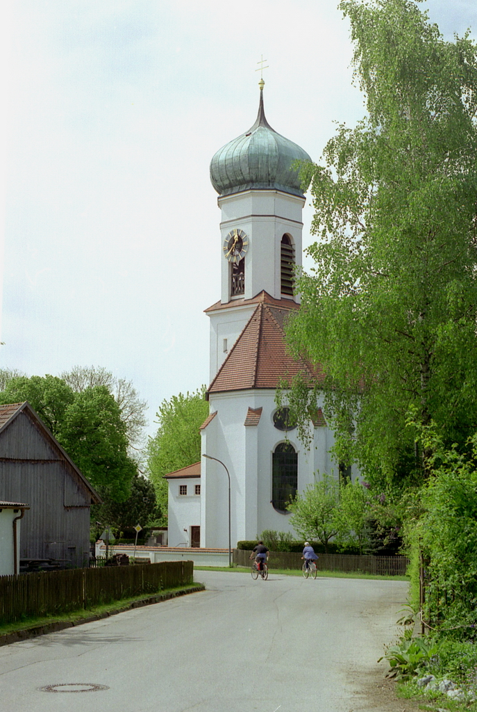 Ansicht von NO